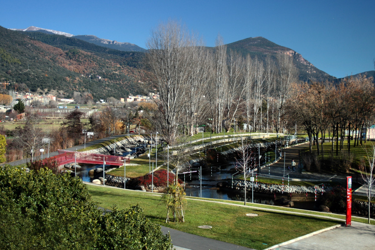 La Seu d'Urgell